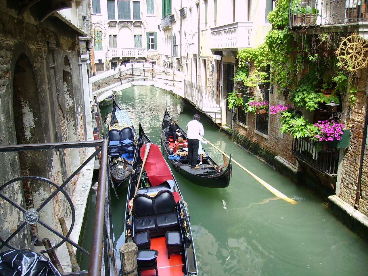 Gondola, Venezia